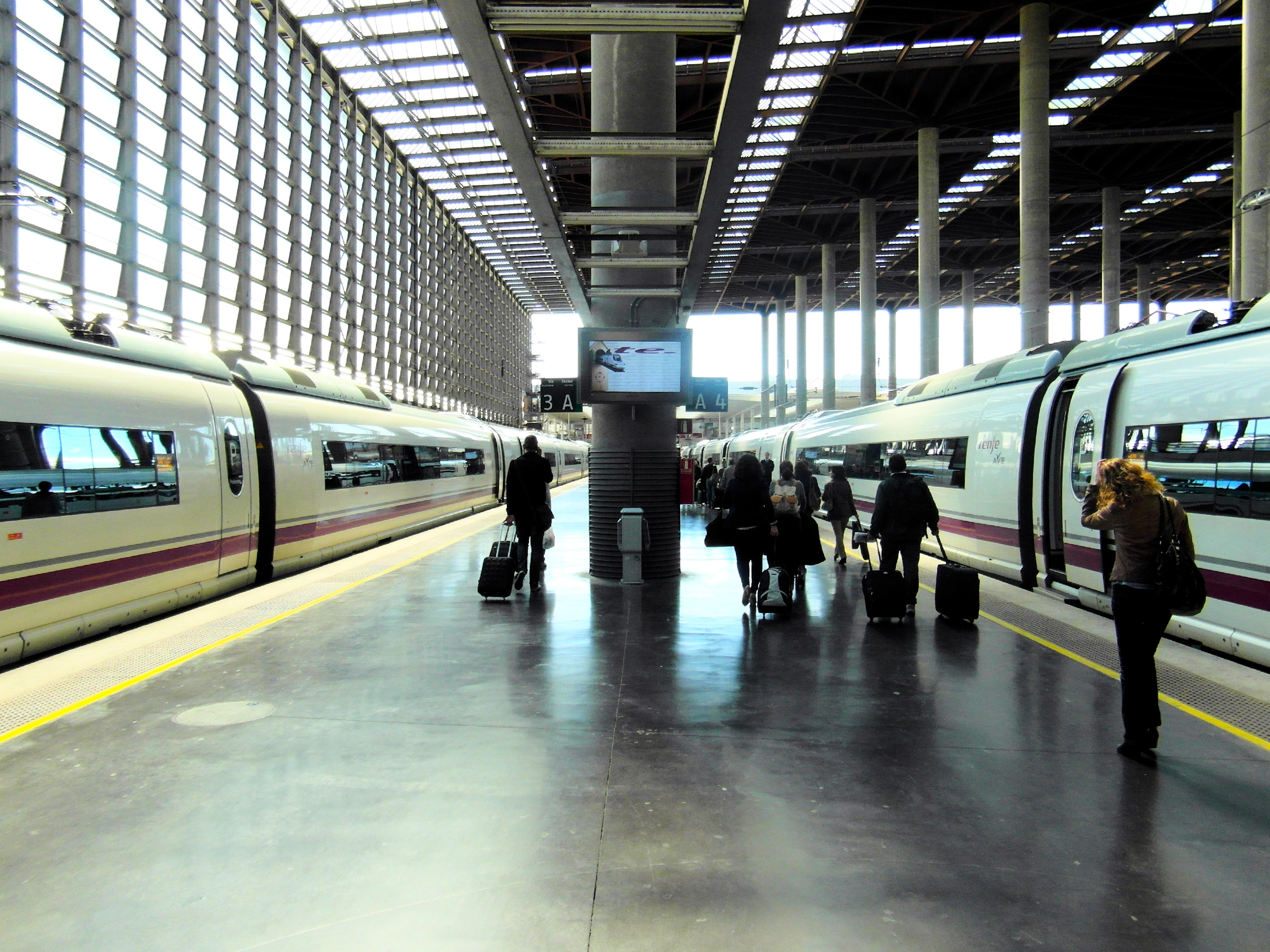 Madrid - Estación de Atocha